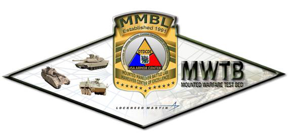 MWTB Logo from 2006